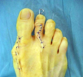 Nach Austin korrigierter Hallux valgus und im proximalen Interphalangealgelenk versteifte II. Zehe